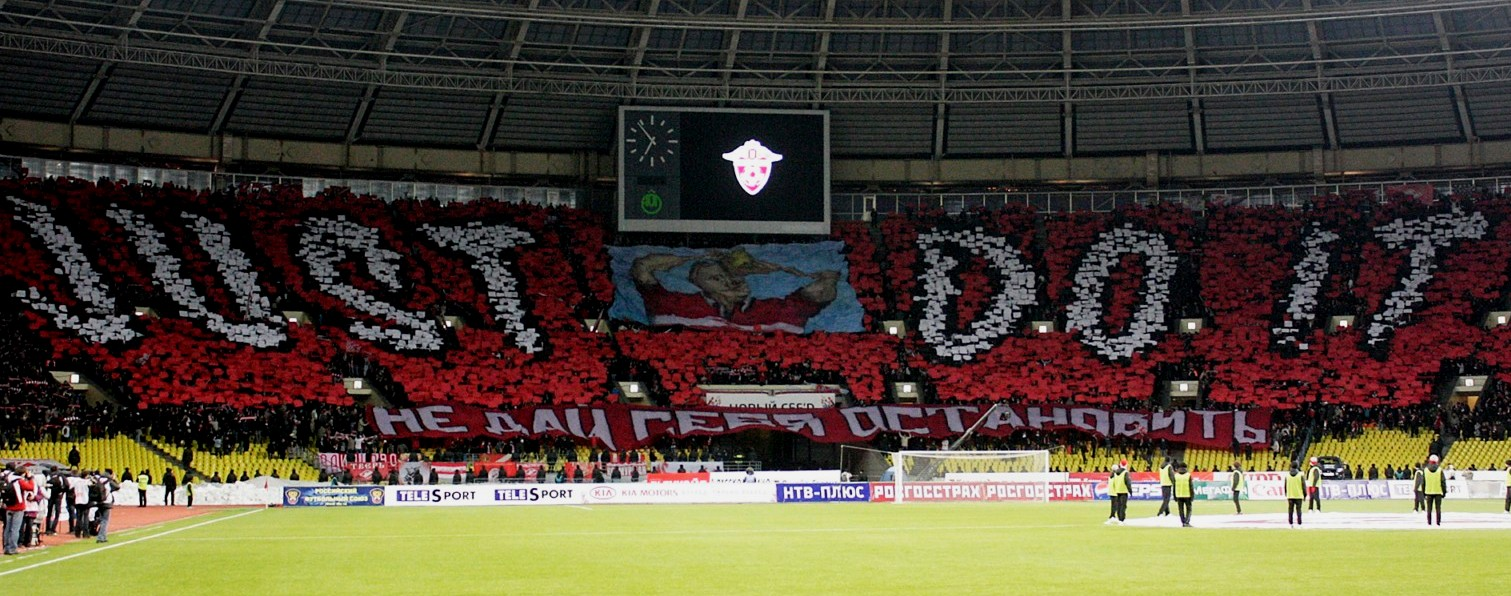 Перфоманс "Just do it!" на дерби против "Динамо". 2010 год